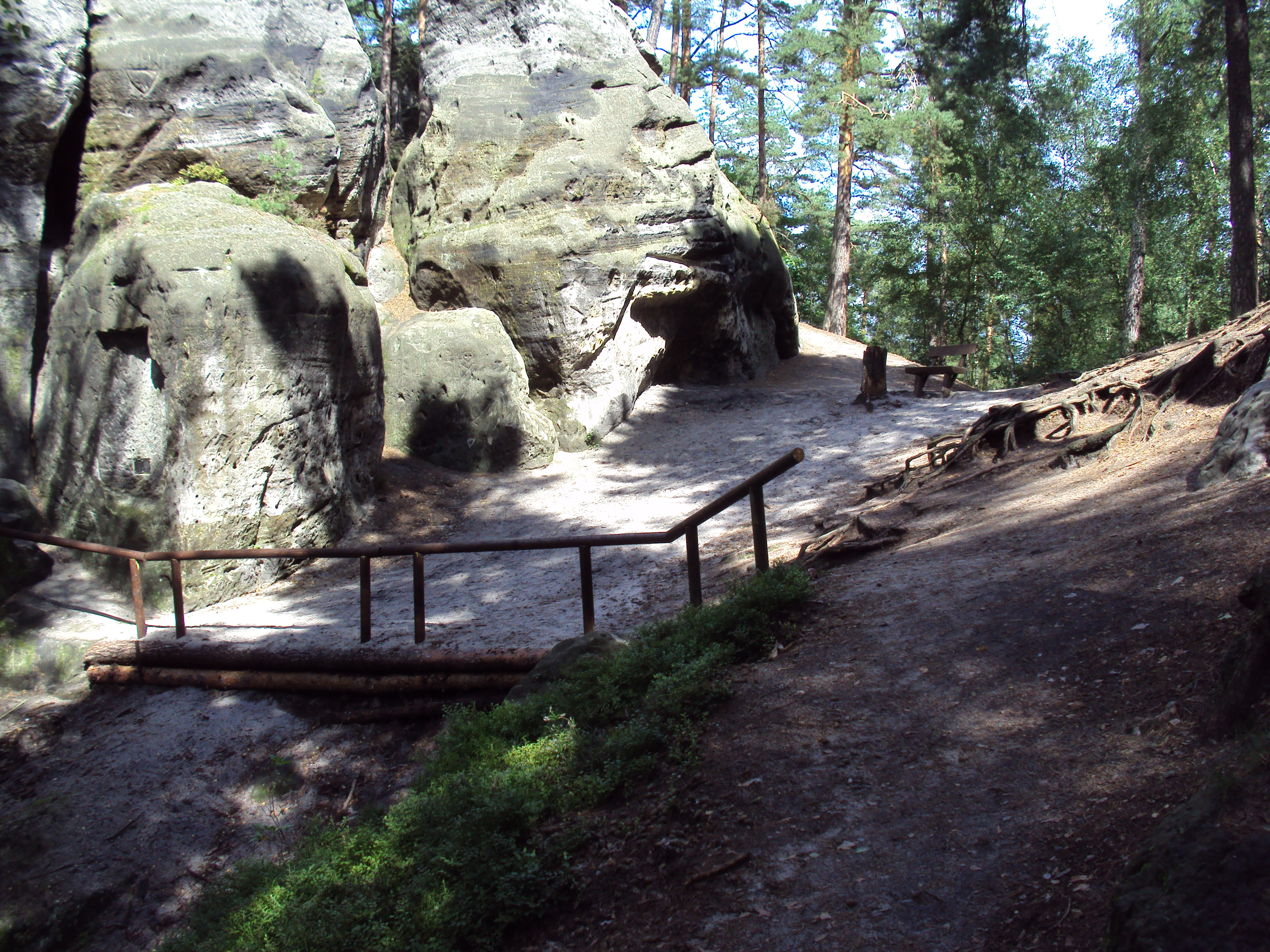 Na skále se Samuelovou jeskyní, Sloup v Čechách